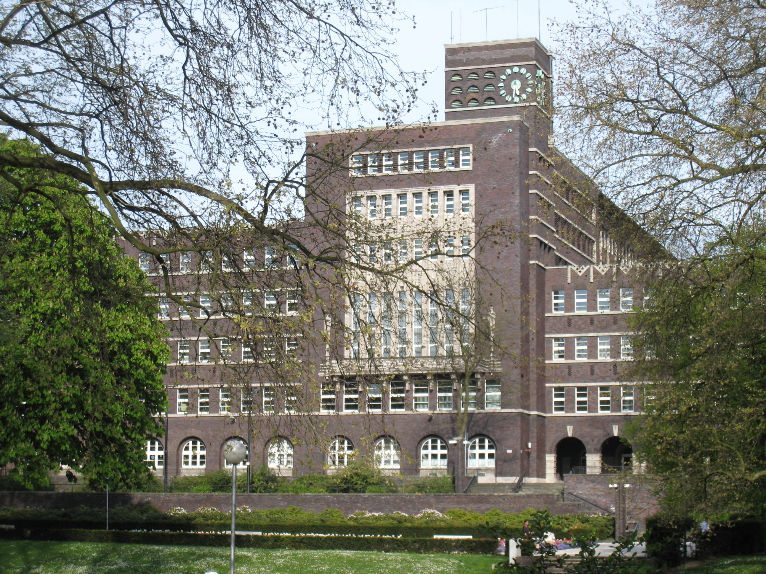 Rathaus des Stadt Oberhausen